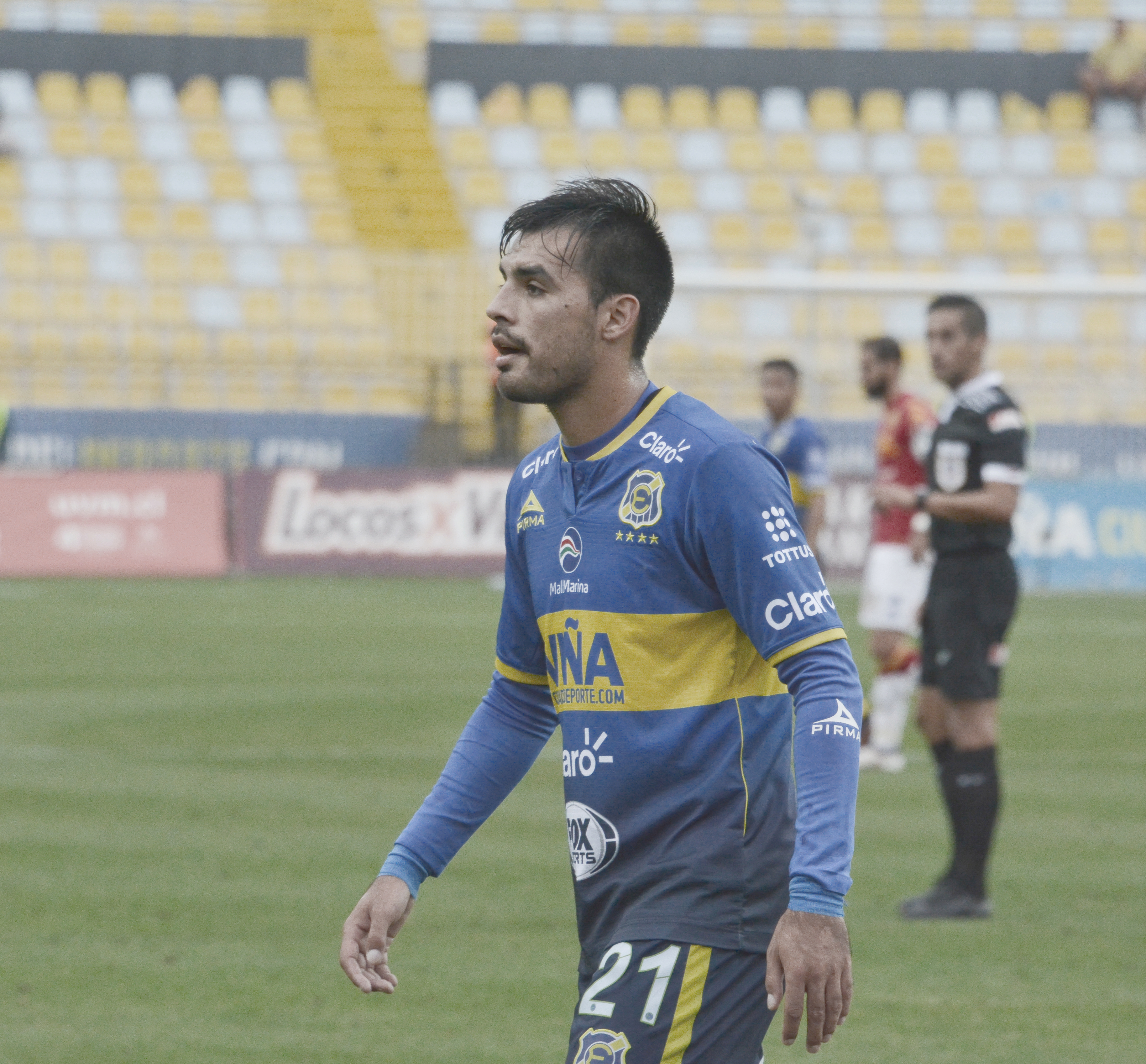 Everton v Unión Española, Estadio Sausalito, Viña del Mar, Chile.